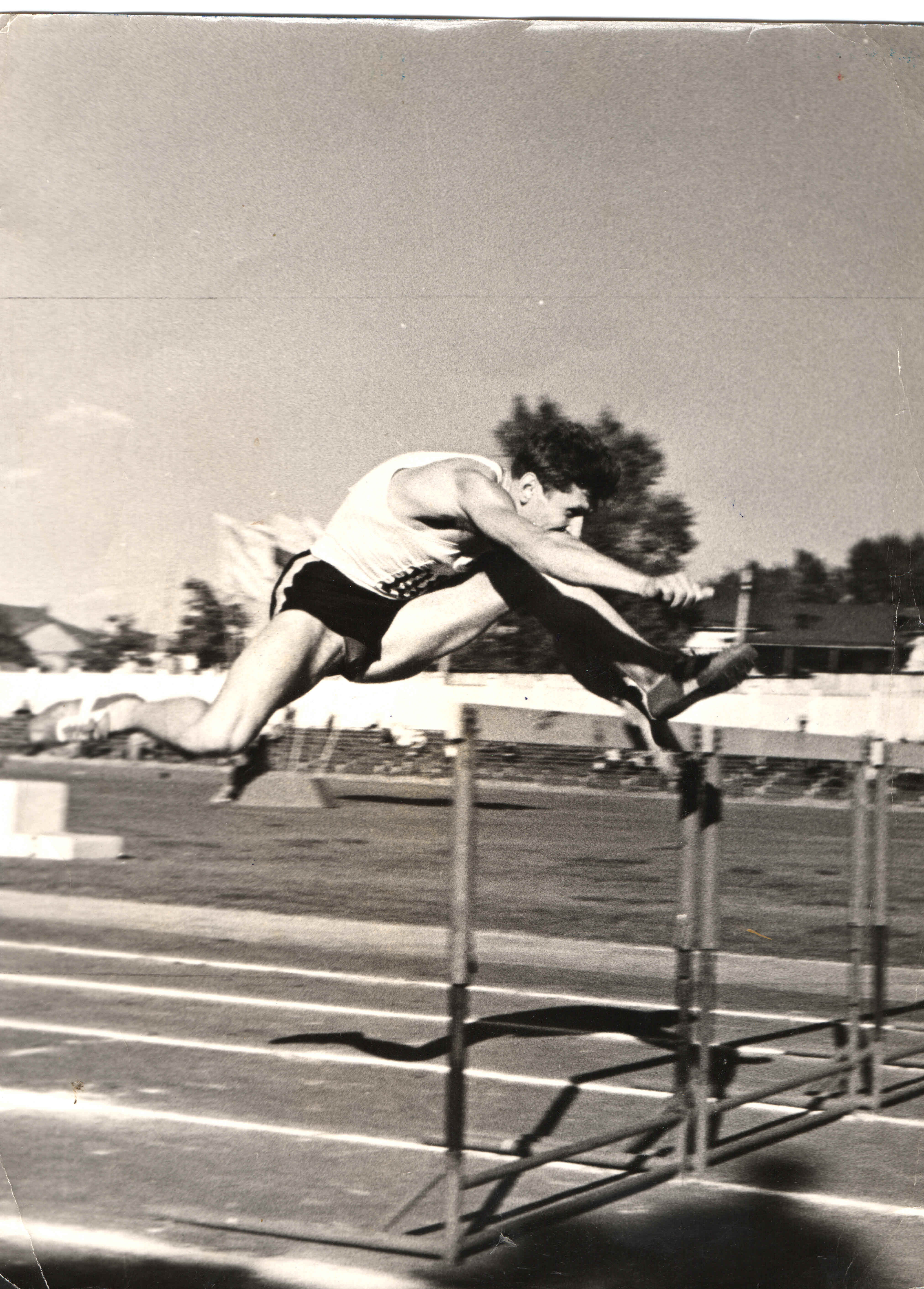 Поляшов Игорь Михайлович выполняет норматив "Мастер спорта"